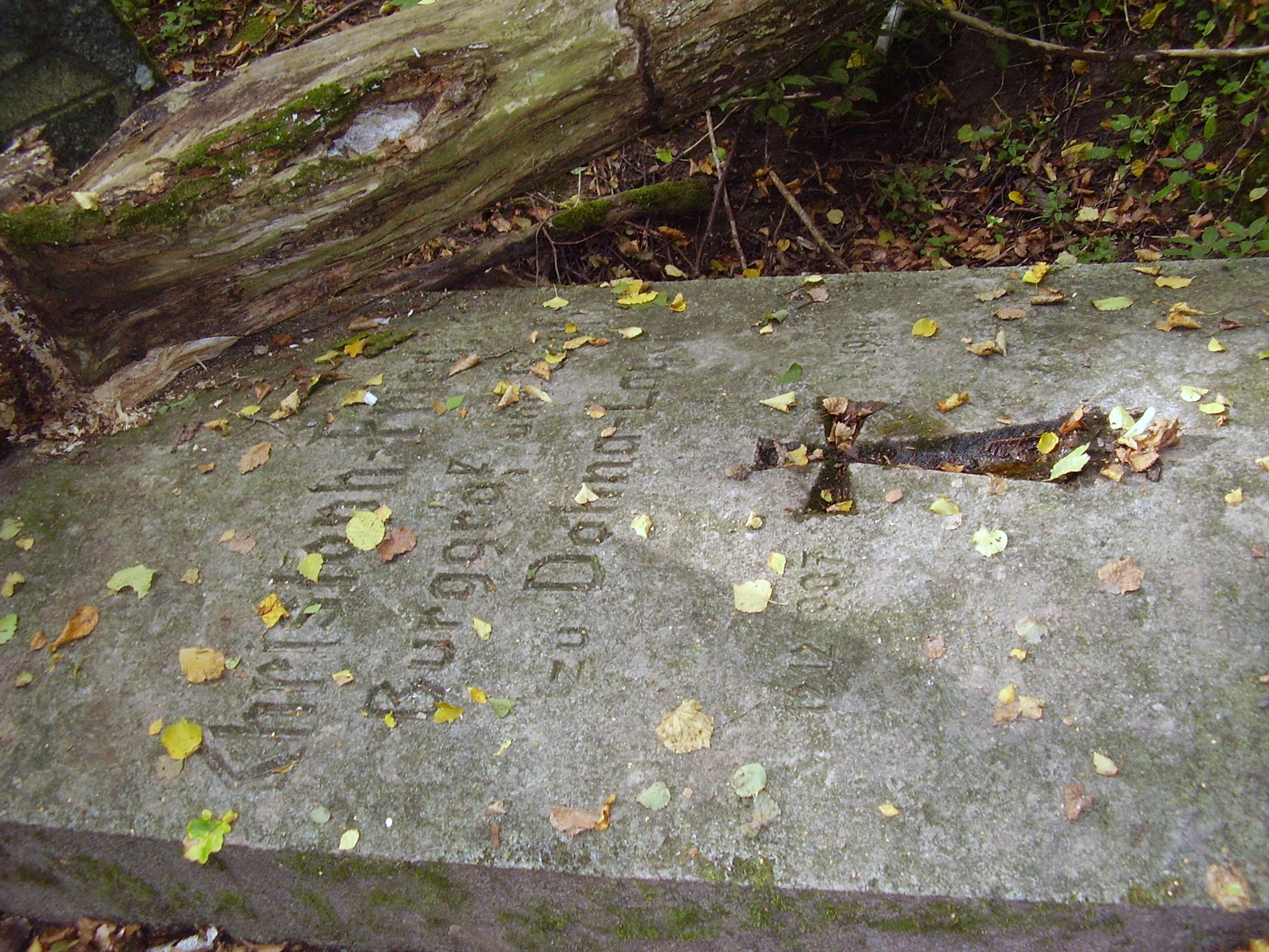 pseudomegalityczny cmantarz rodziny Dohnów (graff zu Dohna)